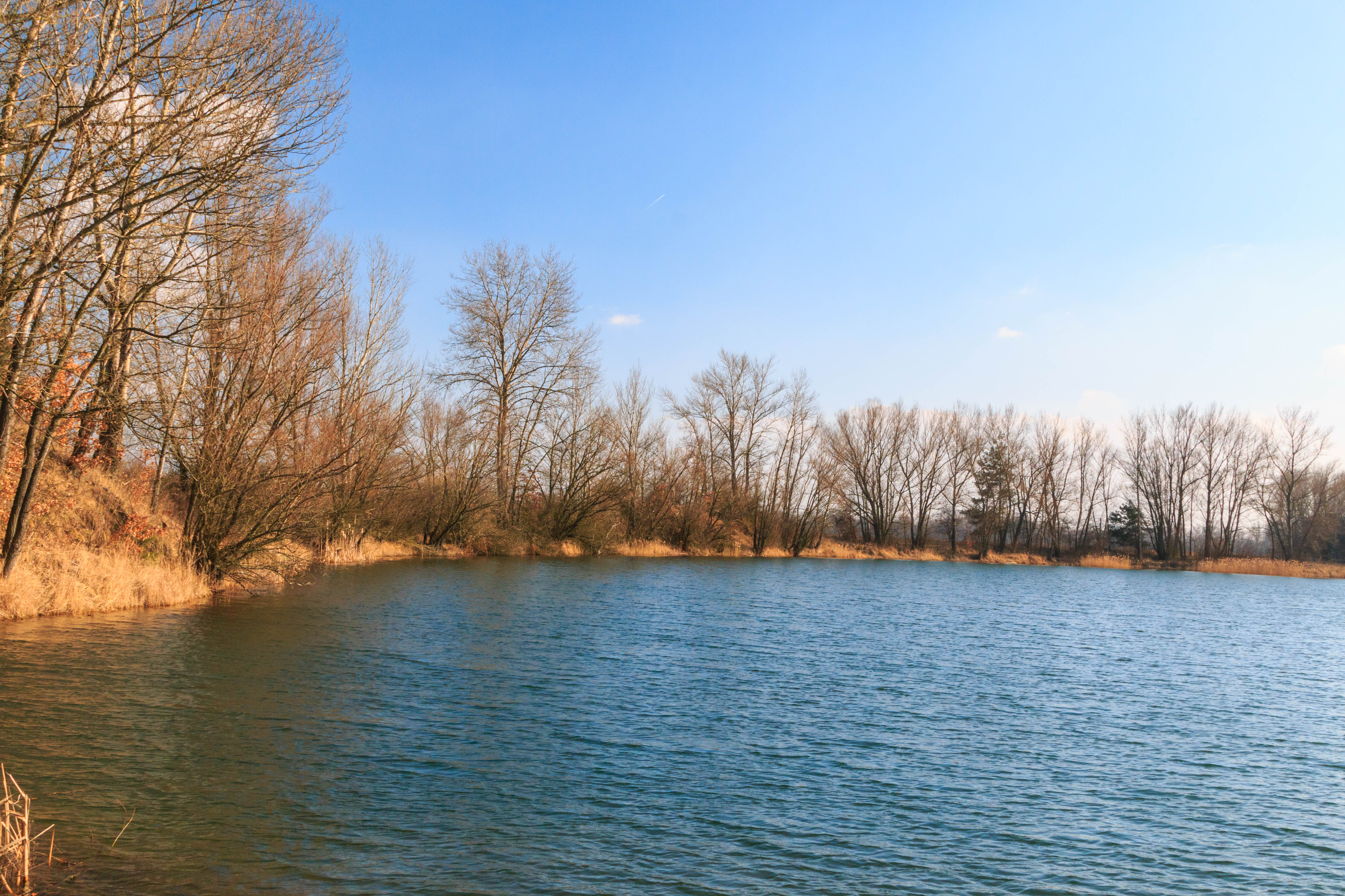 Písníky u Opatovické elektrárny - písník II Project: Vodstvo.